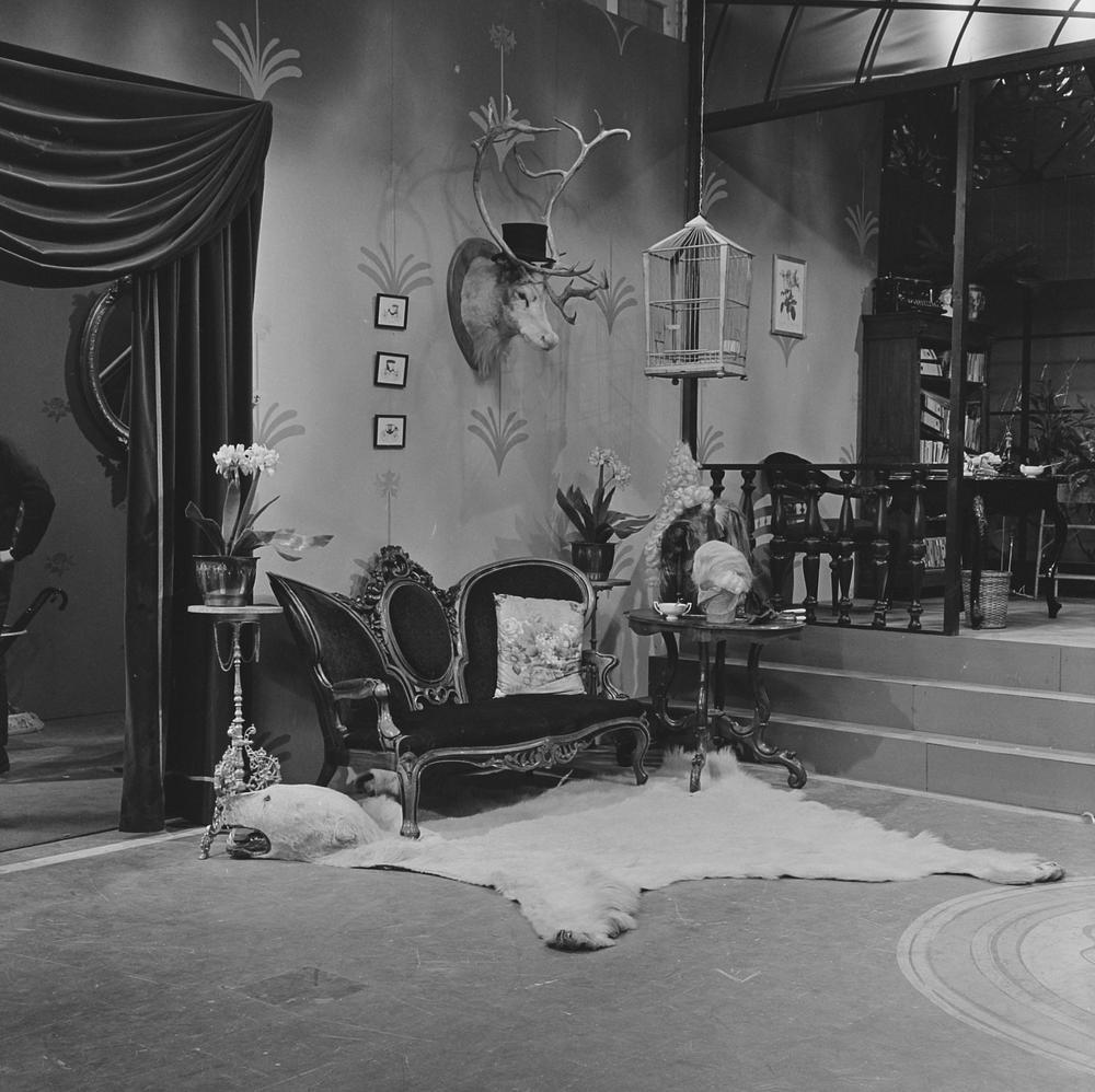 Decorfoto van de Nederlandse televisieserie Ja zuster, nee zuster.